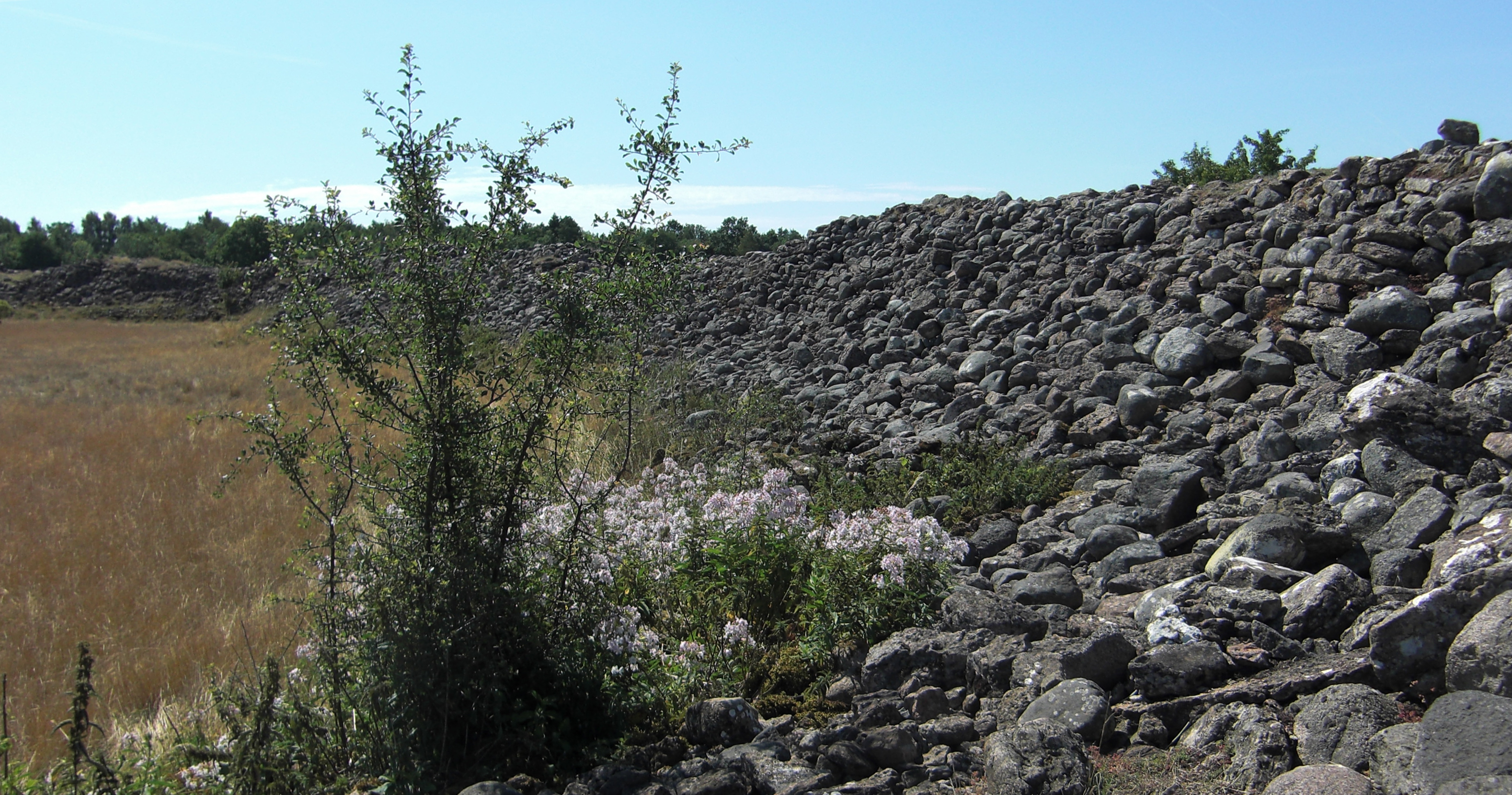 Fornborgen Gråborg (Raä-nr Algutsrum 16:1) i Algutsrums socken, Mörbylånga kommun, Öland, Kalmar län, Sverige.